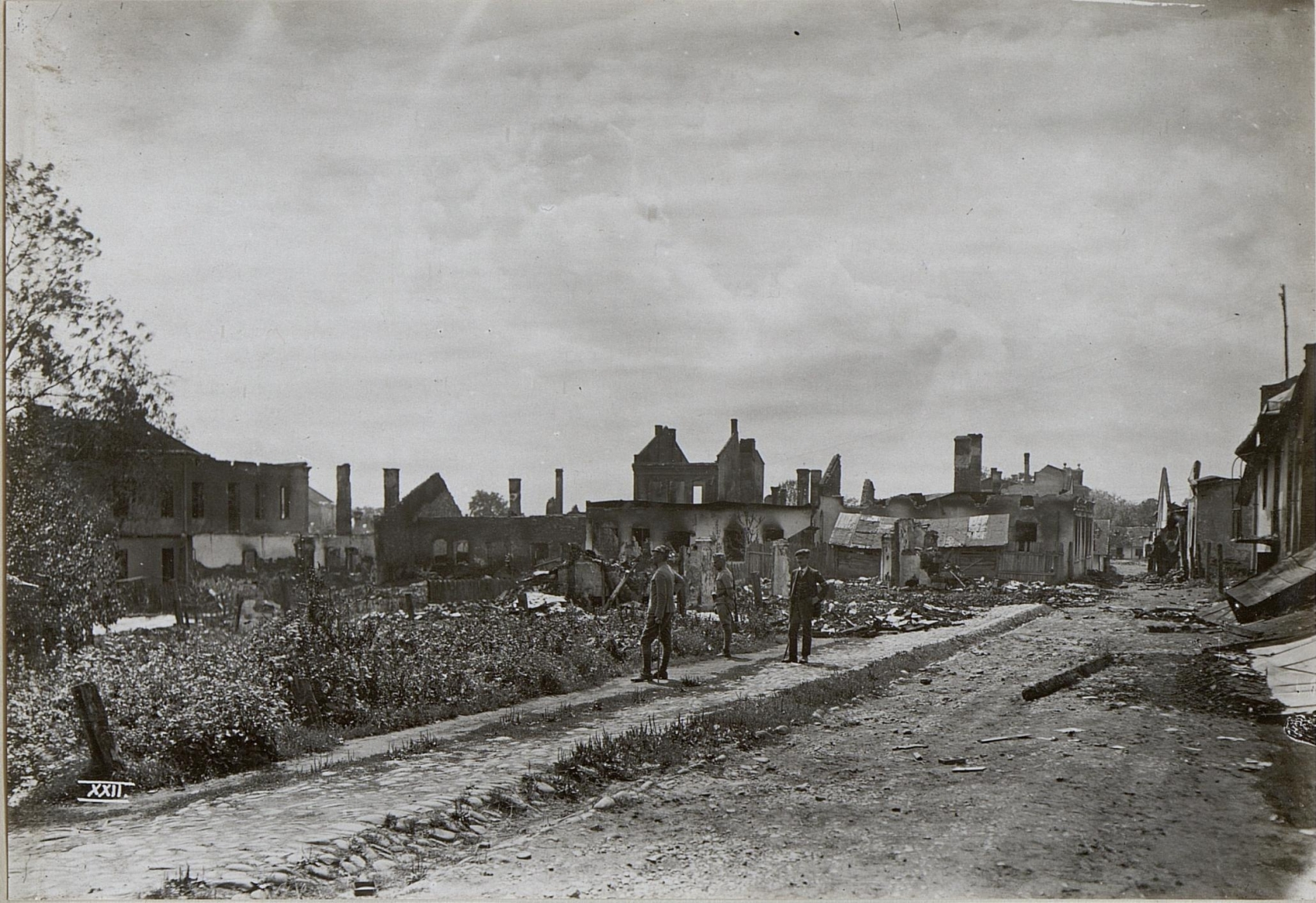 Kalusz